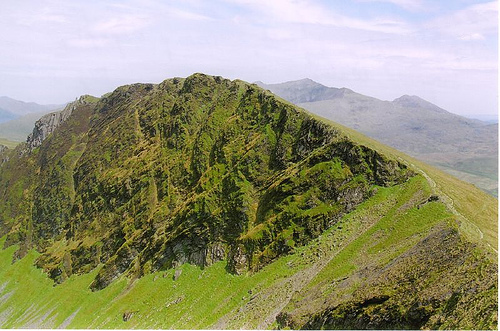 Mynydd Drws-y-Coed from Trum y Ddysgl